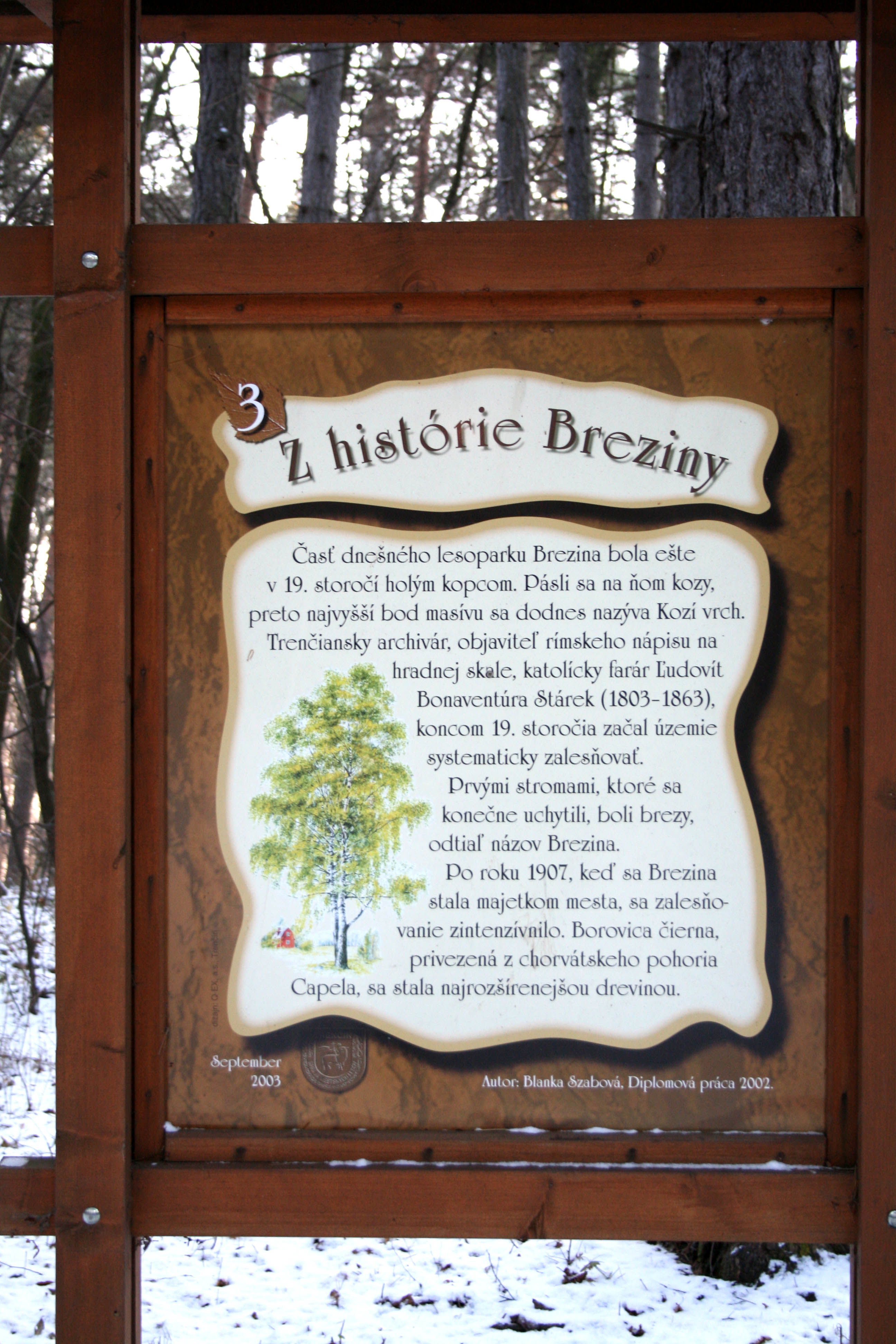 Informačná tabuľa na trenčianskej Brezine